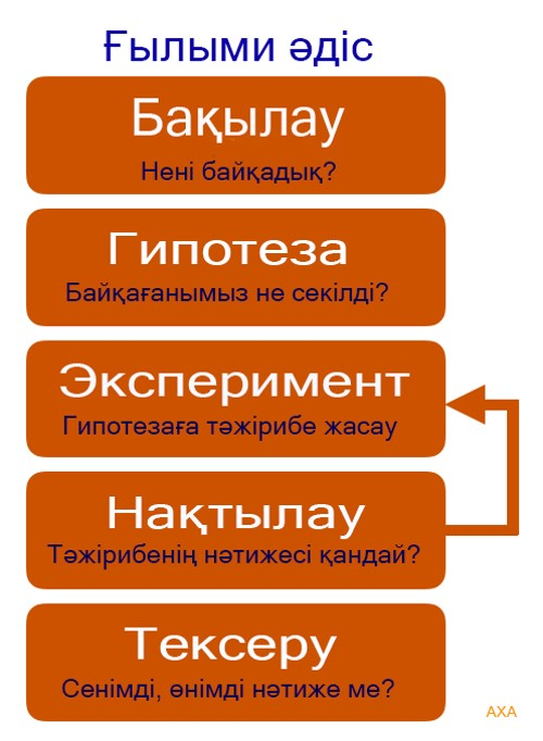 Қазақша (кирил): Ғылым, ғылыми әдіс, ғылыми зерттеу, эксперимент